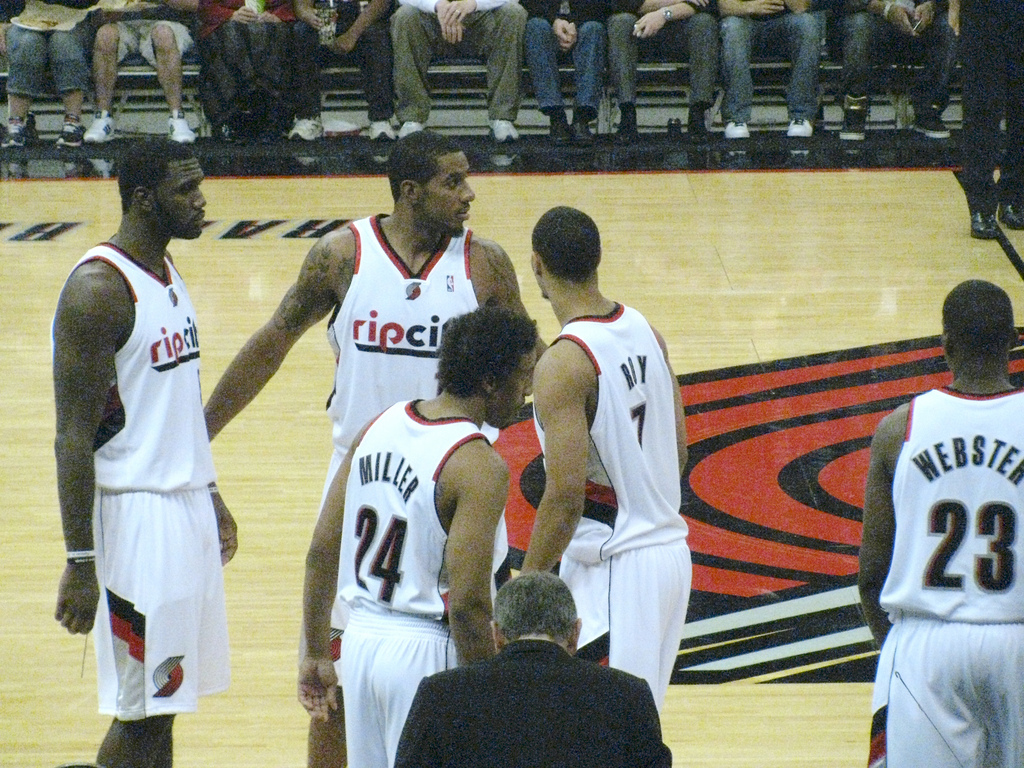 Blazers Starting Five: Greg Oden, LaMarcus Aldridge, Andre Miller, Brandon Roy, Martell Webster, Blazers vs. Suns in Memorial Coliseum, 10/14/09